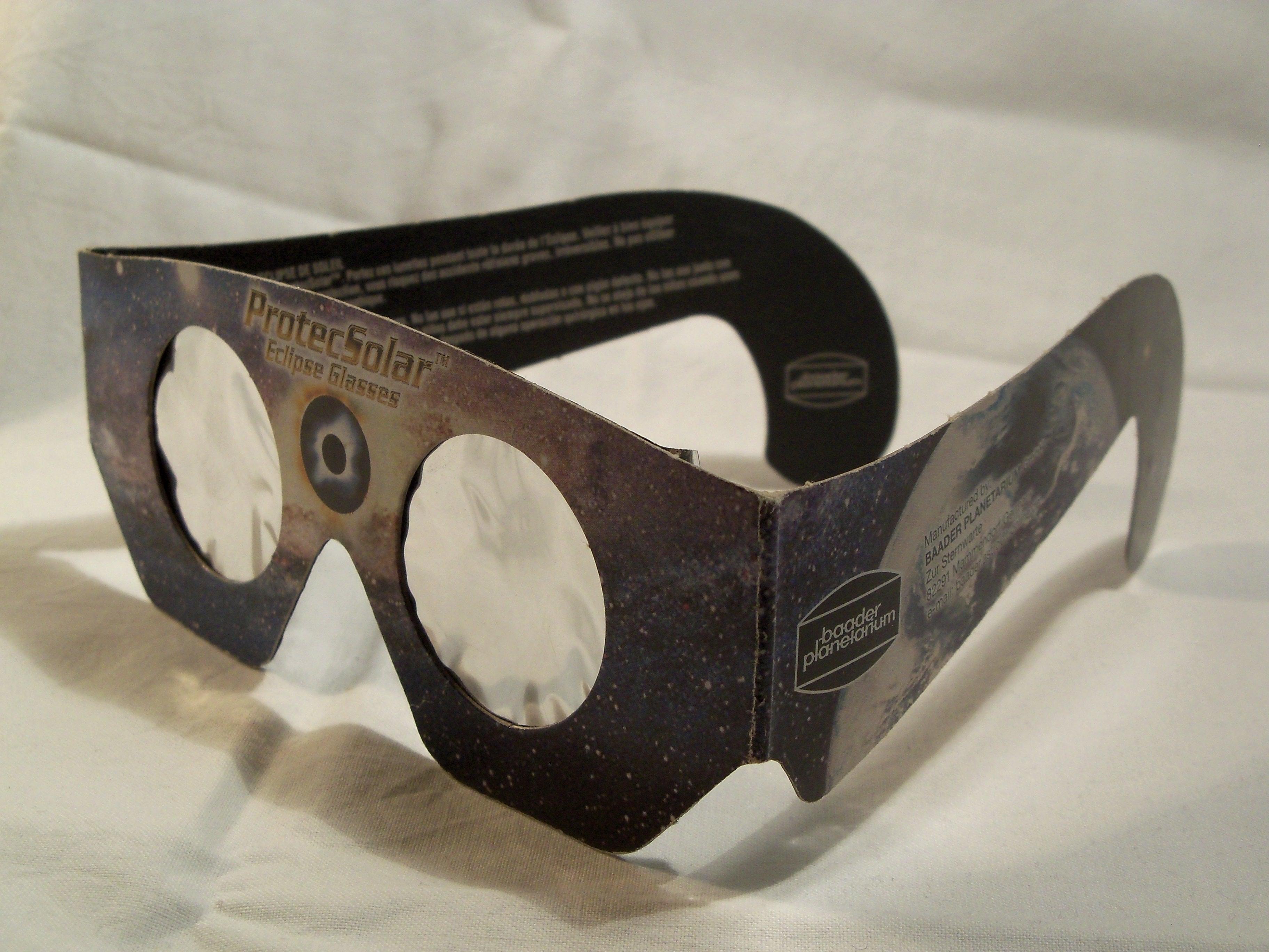 Eine Sonnenfinsternisbrille mit Sonnenschutzfilter aus Pappe